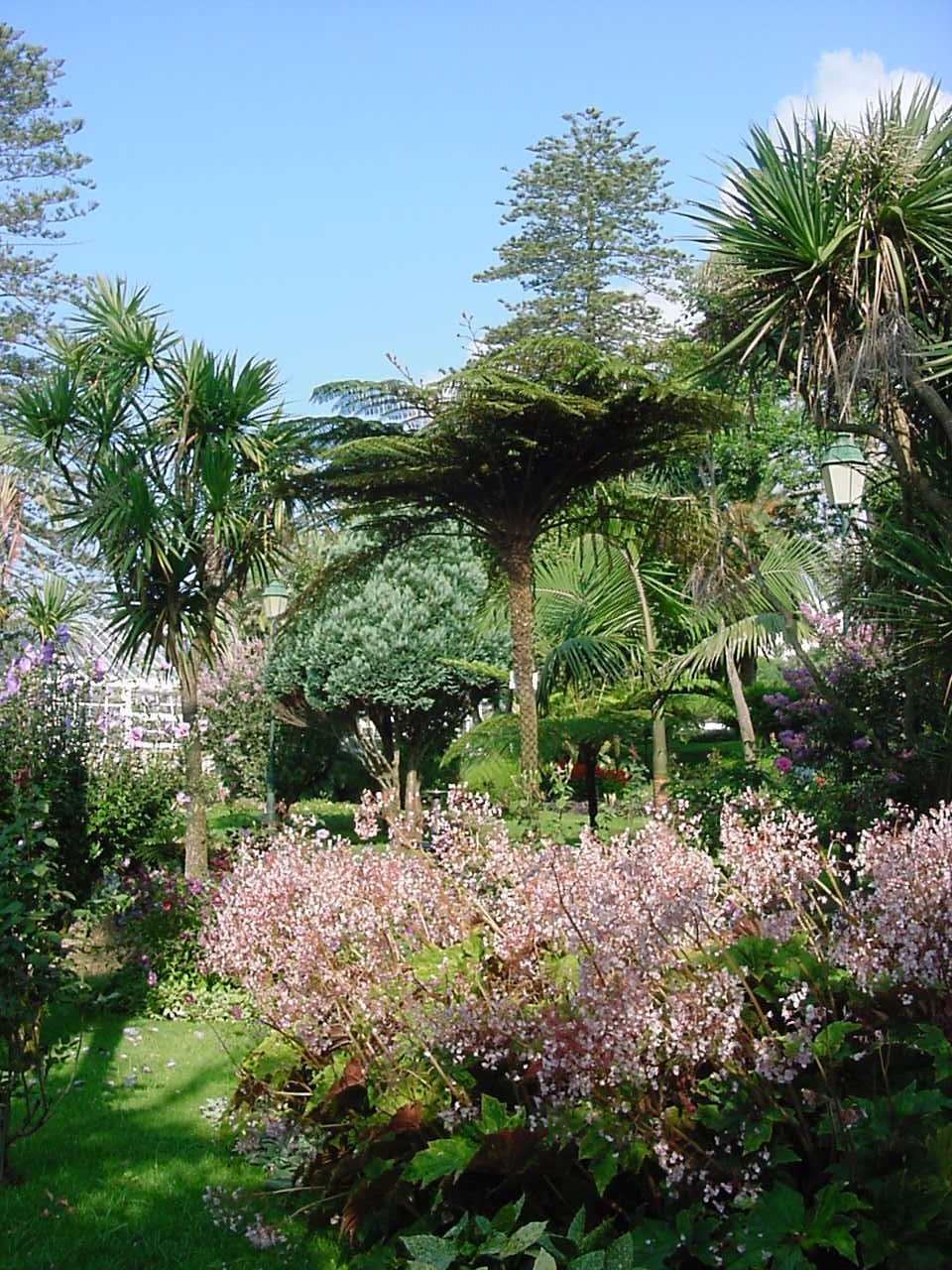 Jardim Duque da Terceira, ilha Terceira, Açores, Portugal.